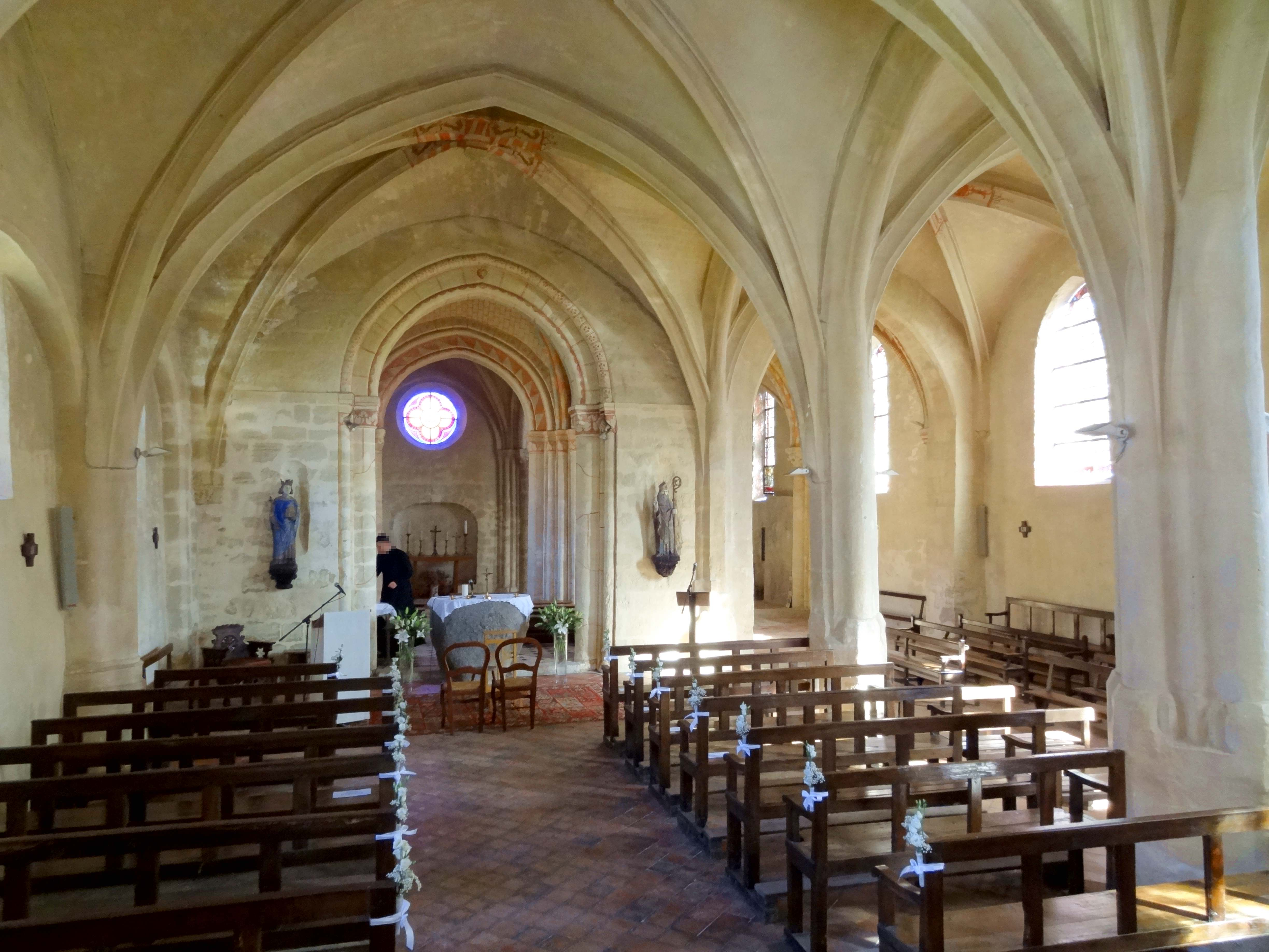 Intérieur de l'église - voir titre.